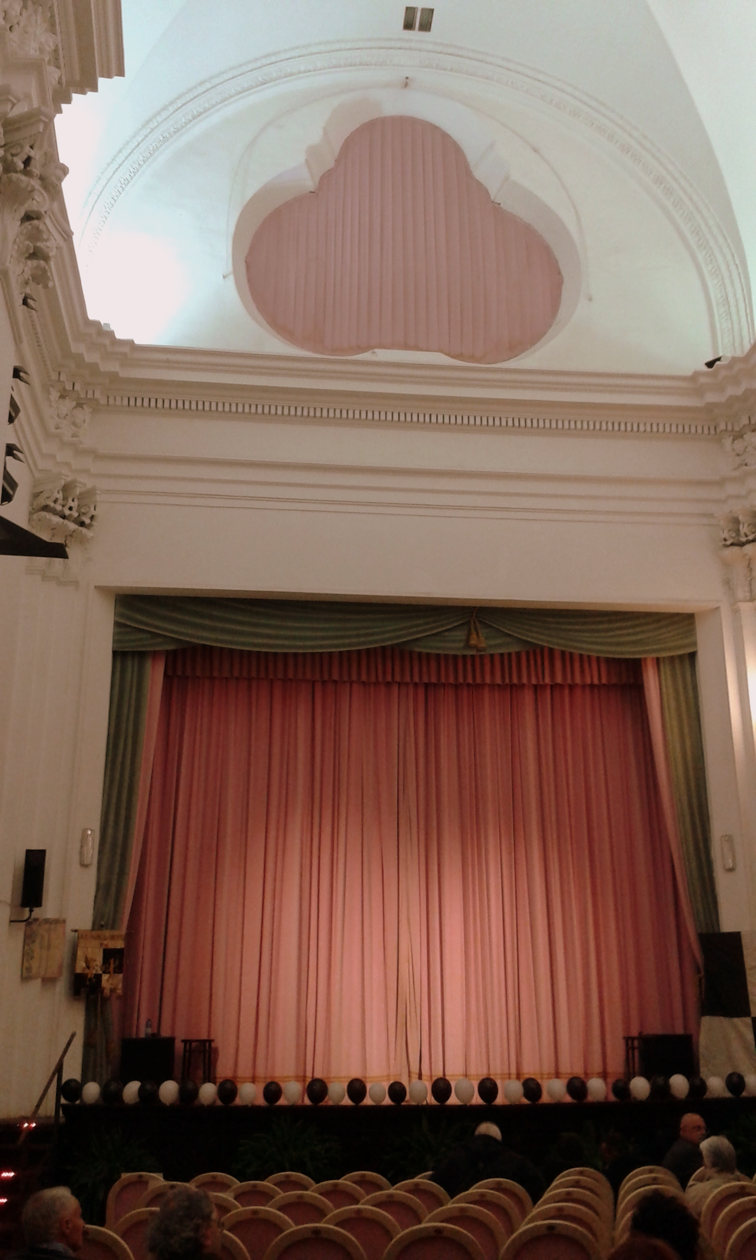 Il palco dell'auditorium delle Clarise, ex complesso monastico delle Clarisse di Rapallo, Liguria, Italia